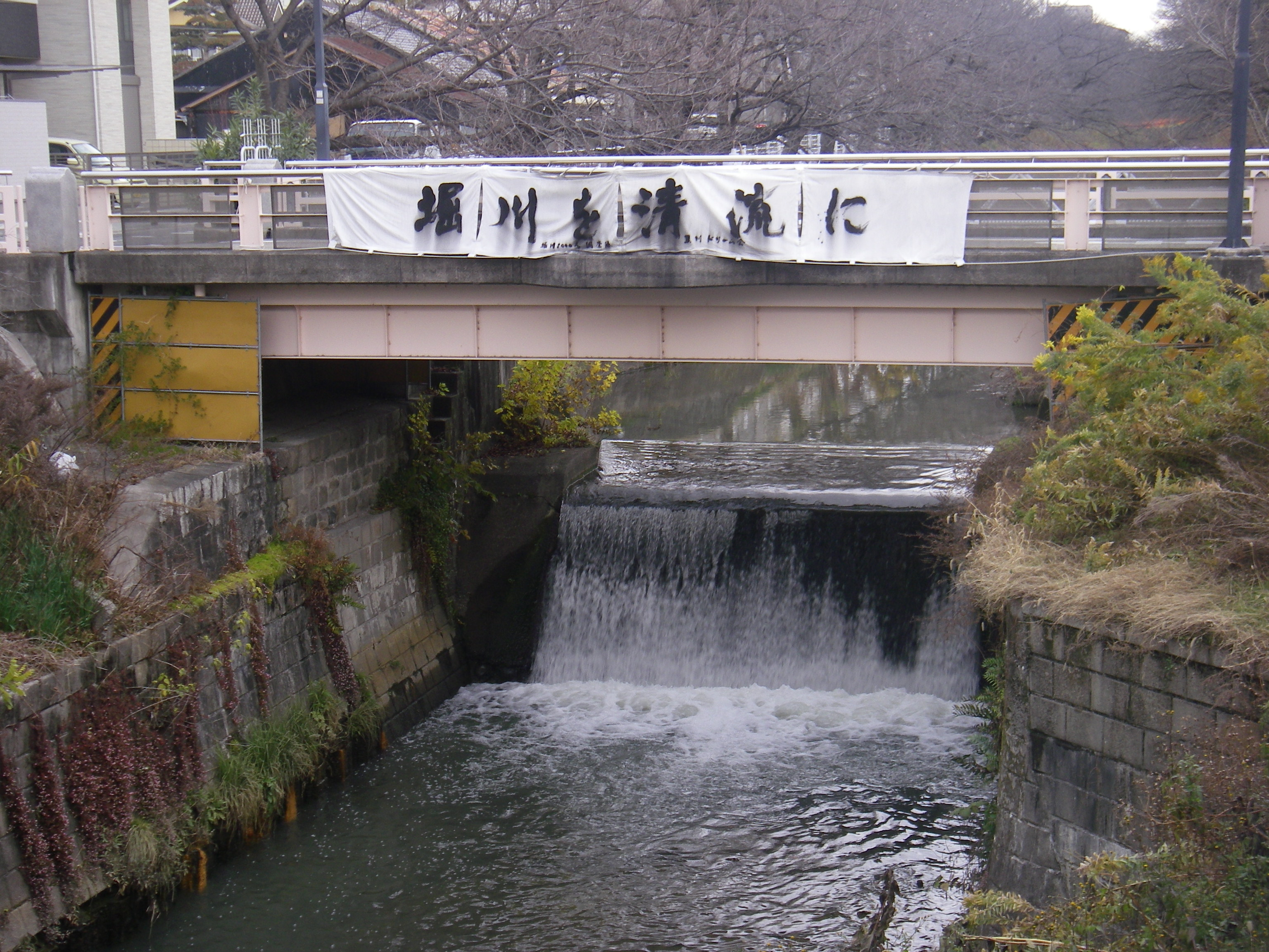 名古屋市の堀川、猿投橋（北区）。堀川は猿投橋の下で3.8mの段差があり、ここより下流は伊勢湾の潮の影響を受ける感潮域となっている。